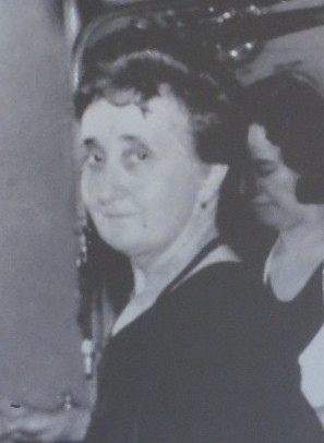 Élisa Blanc, et sa belle mère Virginie Blanc, grand mère et arrière grand mère de Georges Blanc